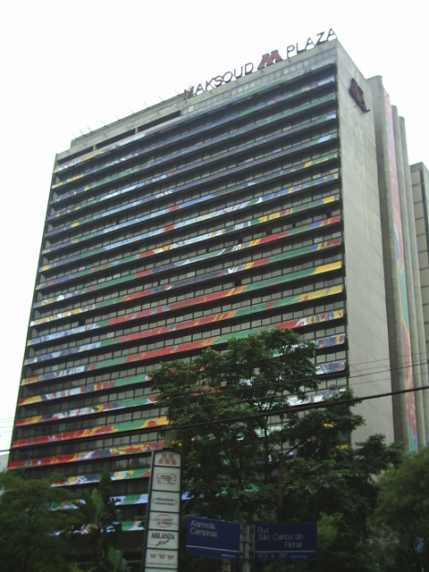 Macksoud Plaza Hotel em São Paulo, Brasil.